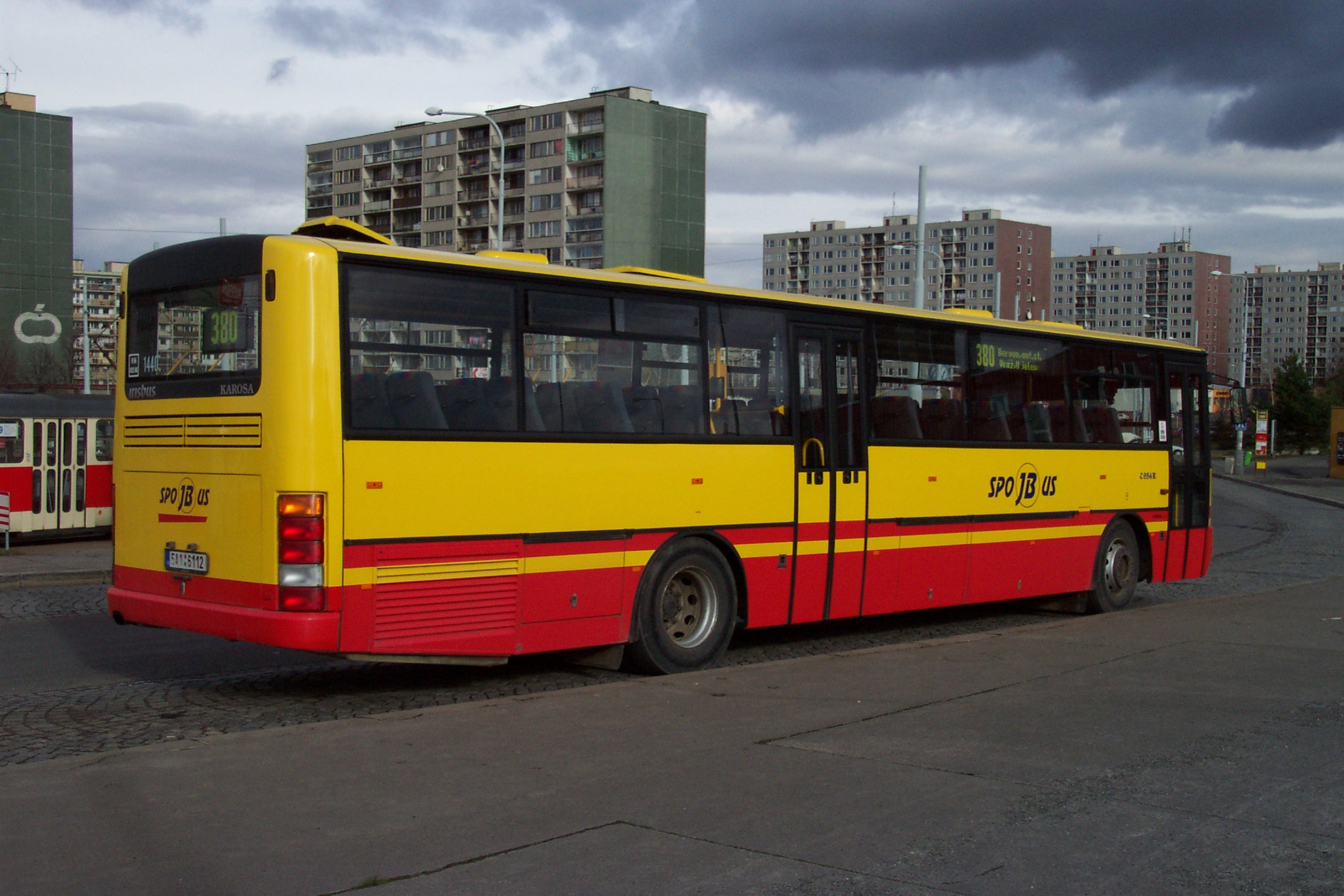 Prague, public bus at Sídliště Řepy - Praha, autobus příměstské dopravy na Sídlišti Řepy